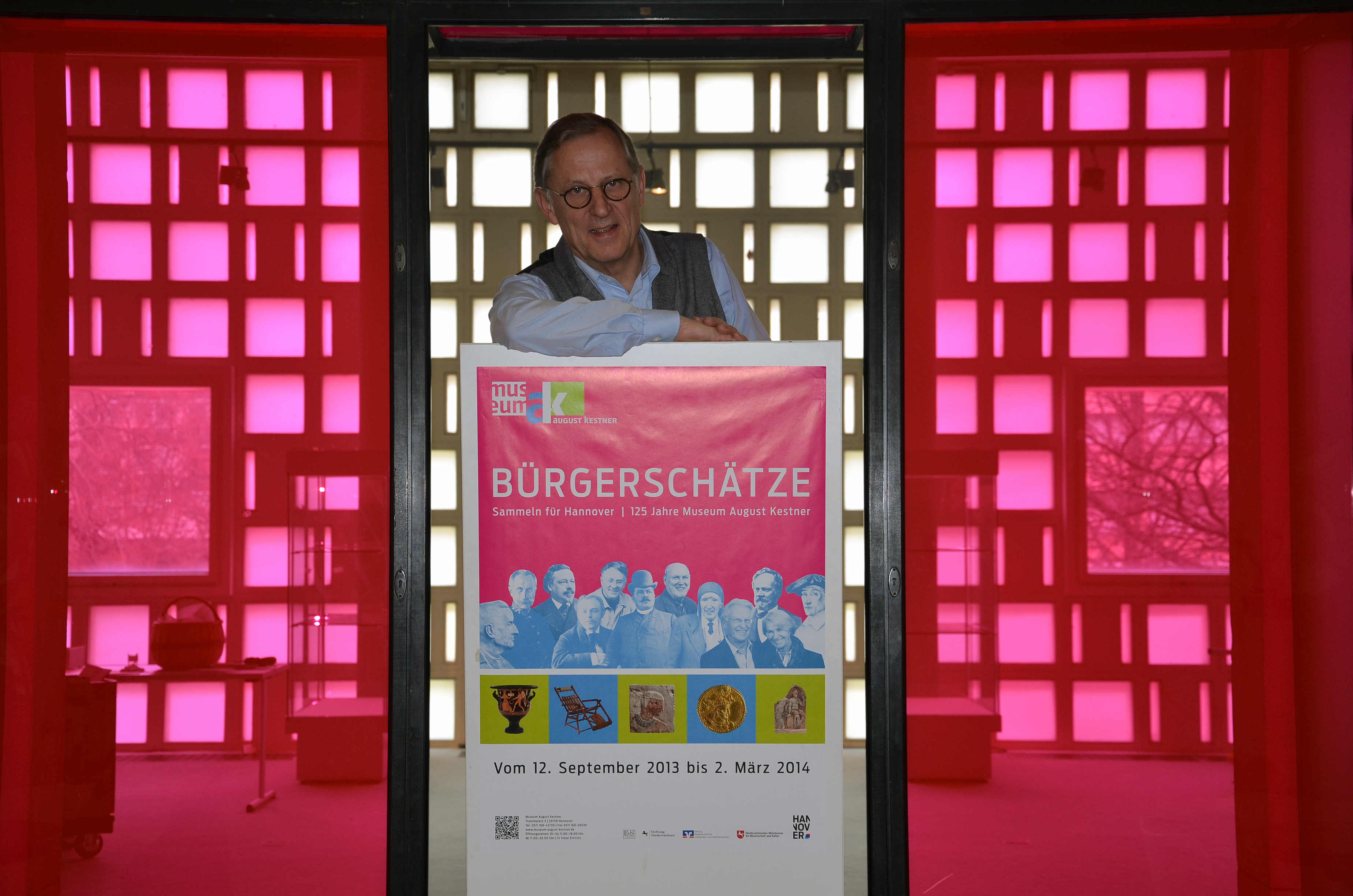 Inmitten der historischen und vor der in den 1960er Jahren vorgebauten Fassade des Museums August Kestner lehnt Museumsdirektor Wolfgang Schepers für Commons in einer mit farbigem Plexiglas umgestalteten Vitrine auf dem Plakatständer zur Ausstellung Bürgerschätze - Sammeln für Hannover ... die anlässlich des 125jährigen "Geburtstages" des ältesten städtischen Museums im Jahr 2014 hinweist …